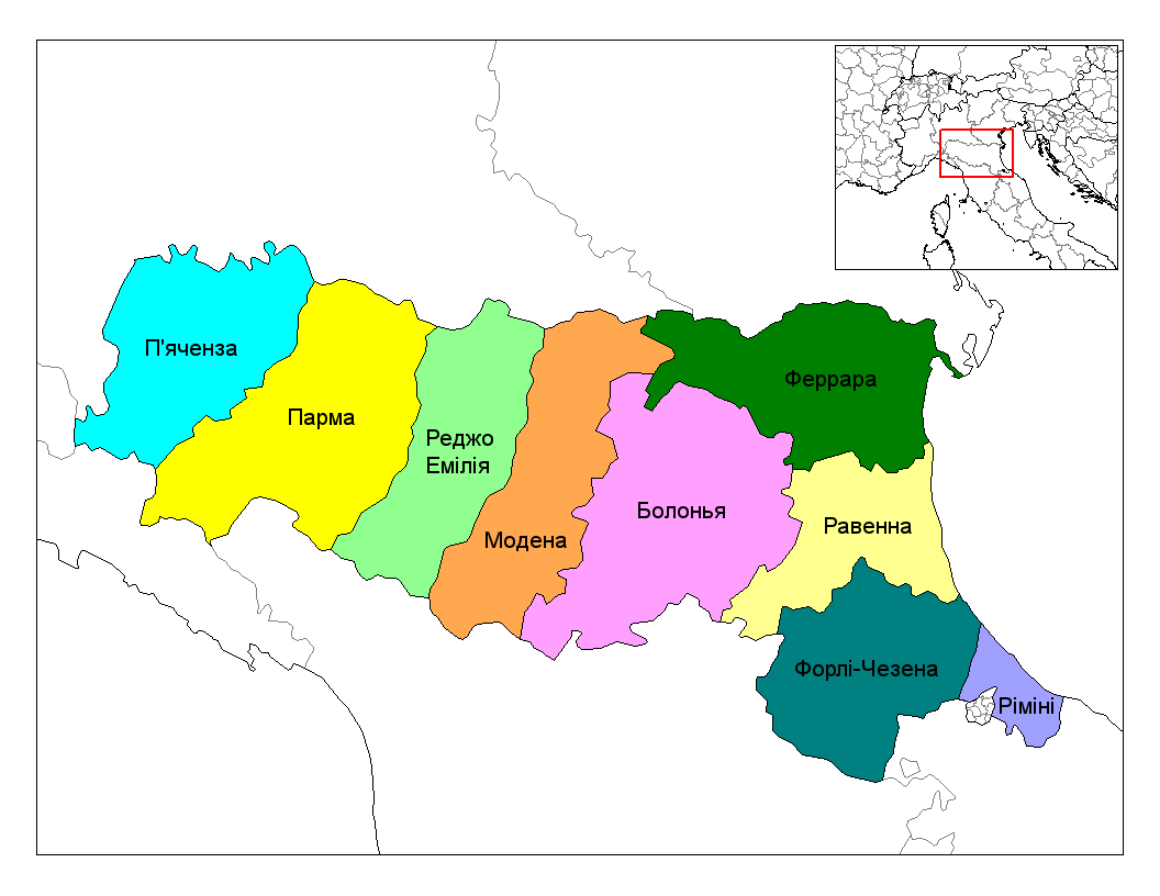 Провінції області Емілія-Романья